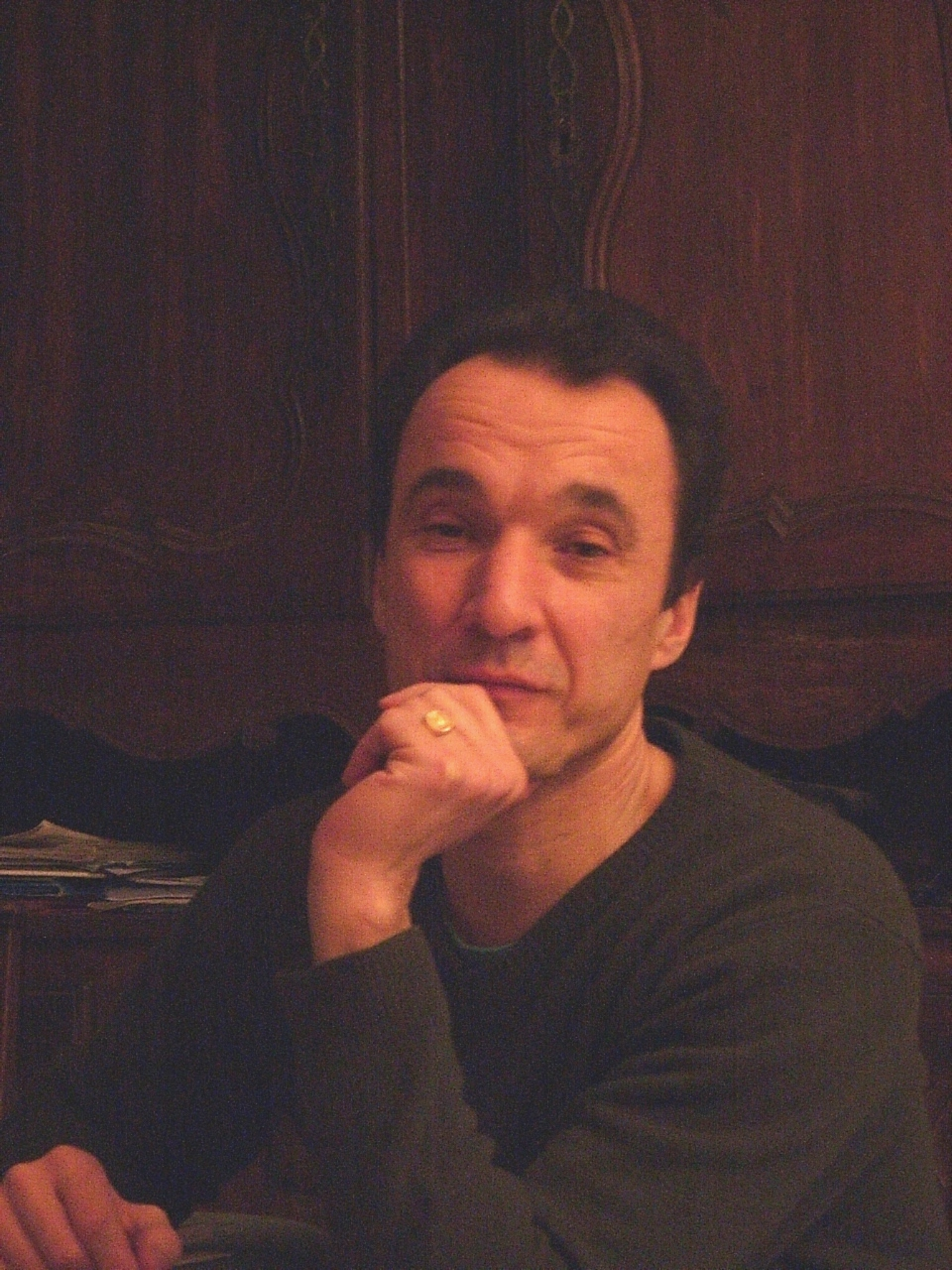 Arnaud Courlet de Vregille, en 2007